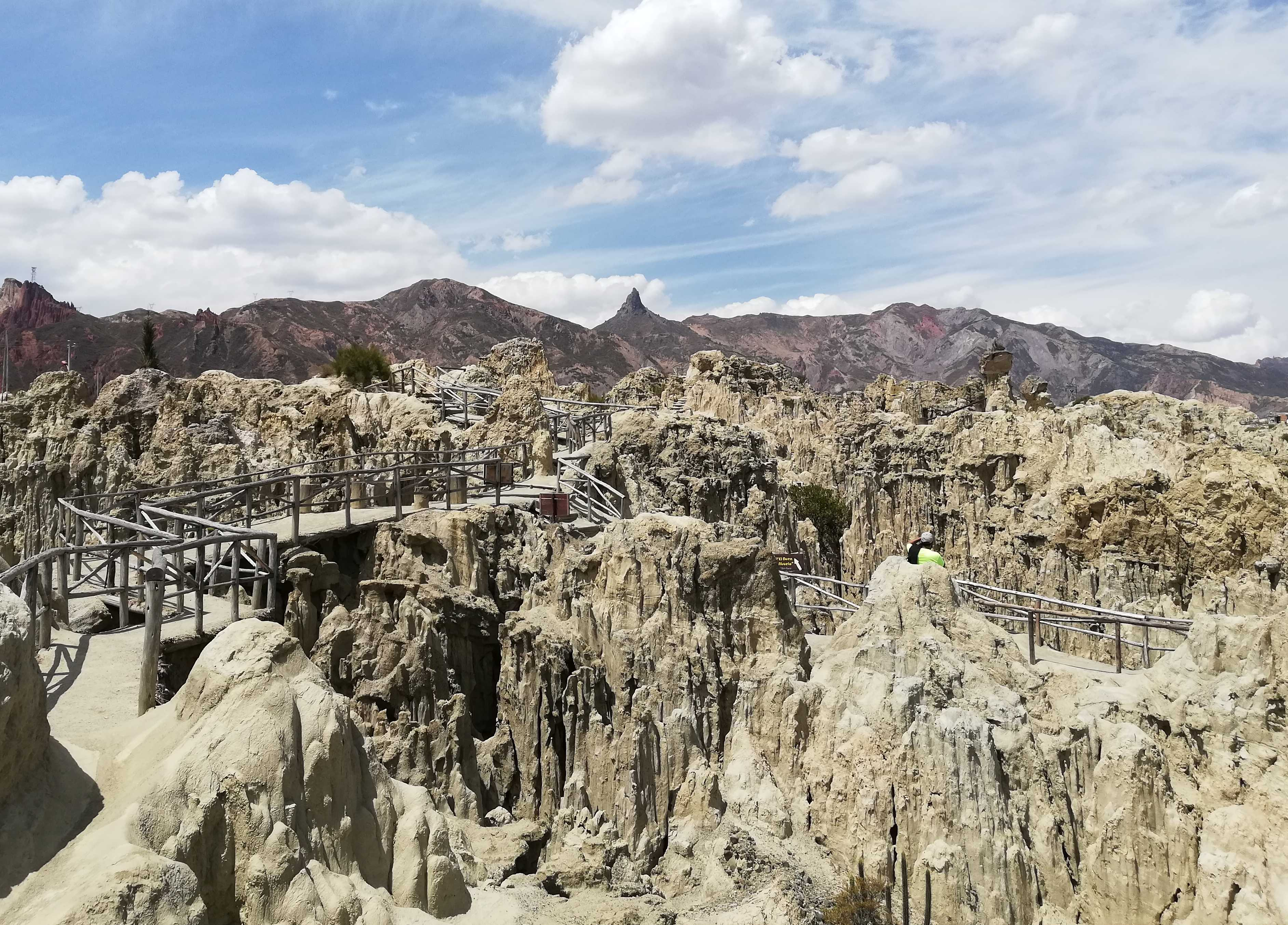 Valle de la Luna